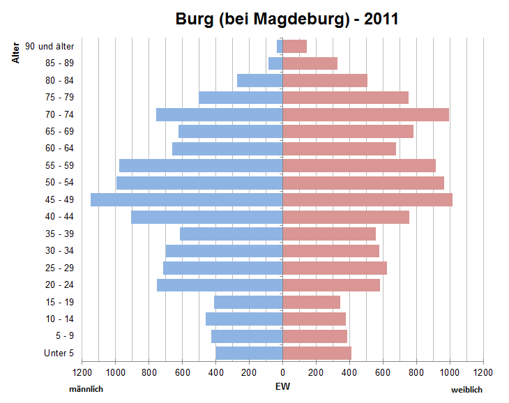 Bevölkerungspyramide der Stadt Burg (bei Magdeburg) nach Zensus 2011.